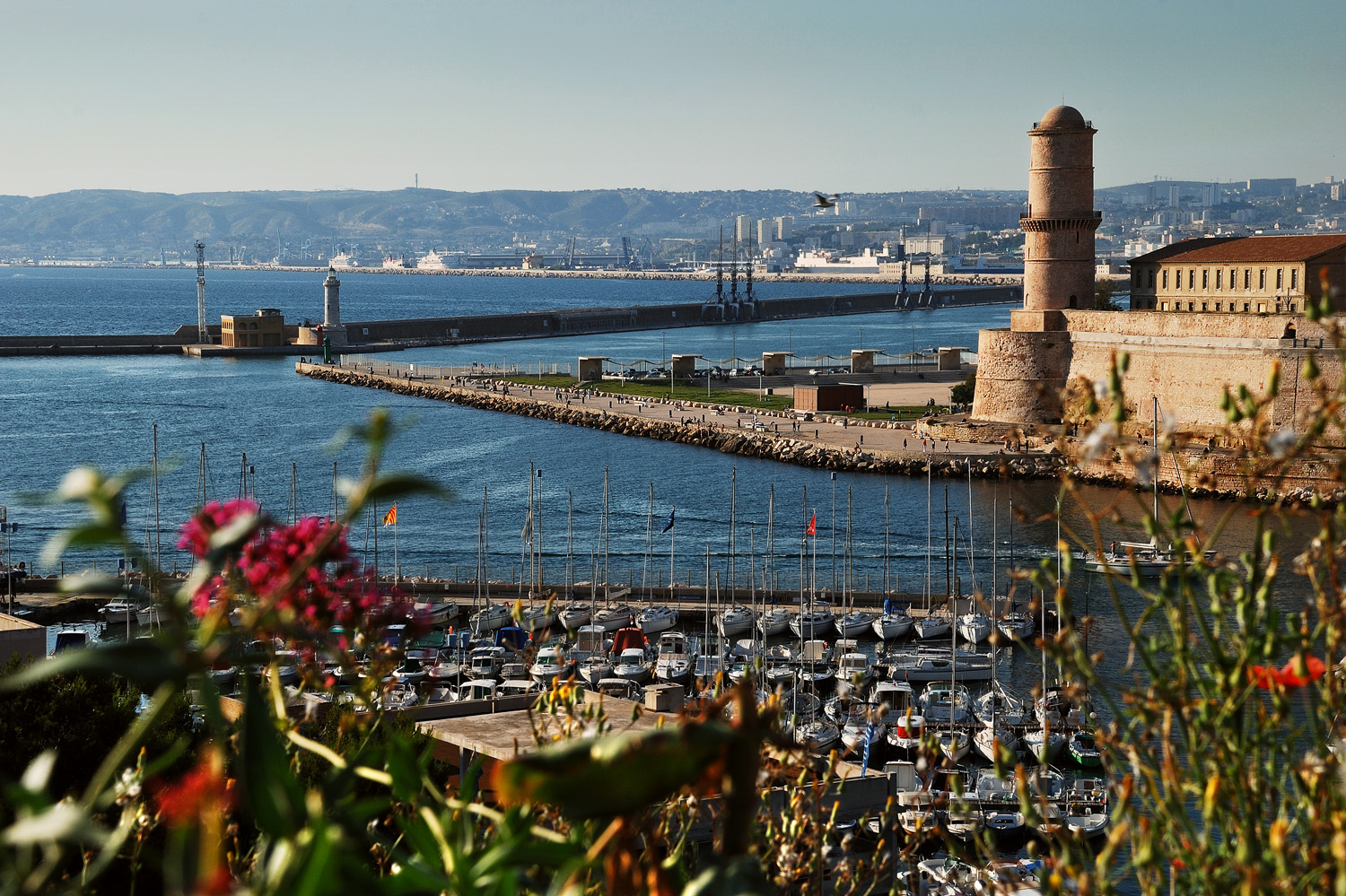 Марсель, Франция. Старый порт, форт св. Иоана и башня Fanal (это именно Tour du Fanal, а не Category:Tour du roi René - та квадратная в плане).